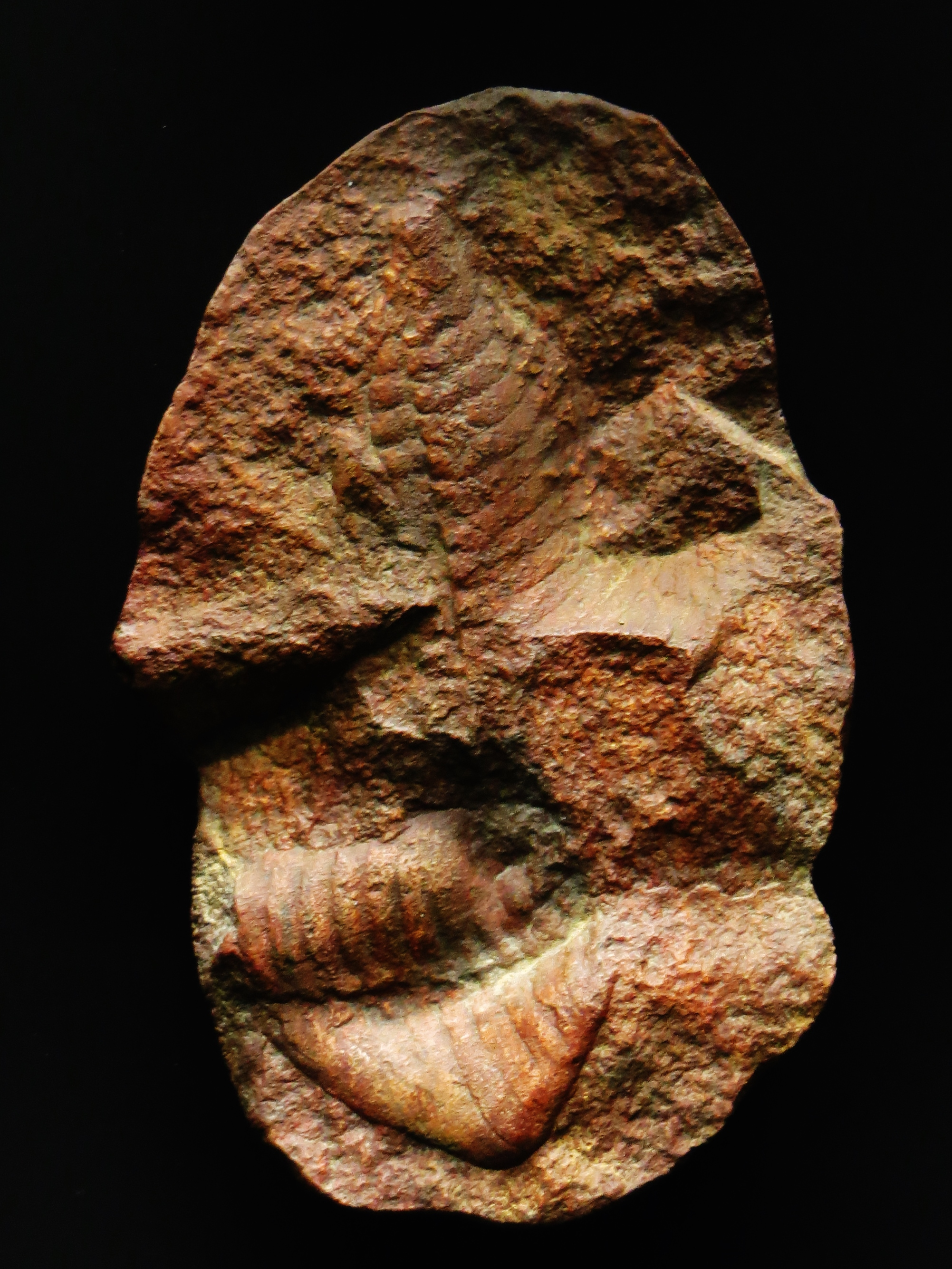 Took the picture at Senckenberg Museum, Frankfurt